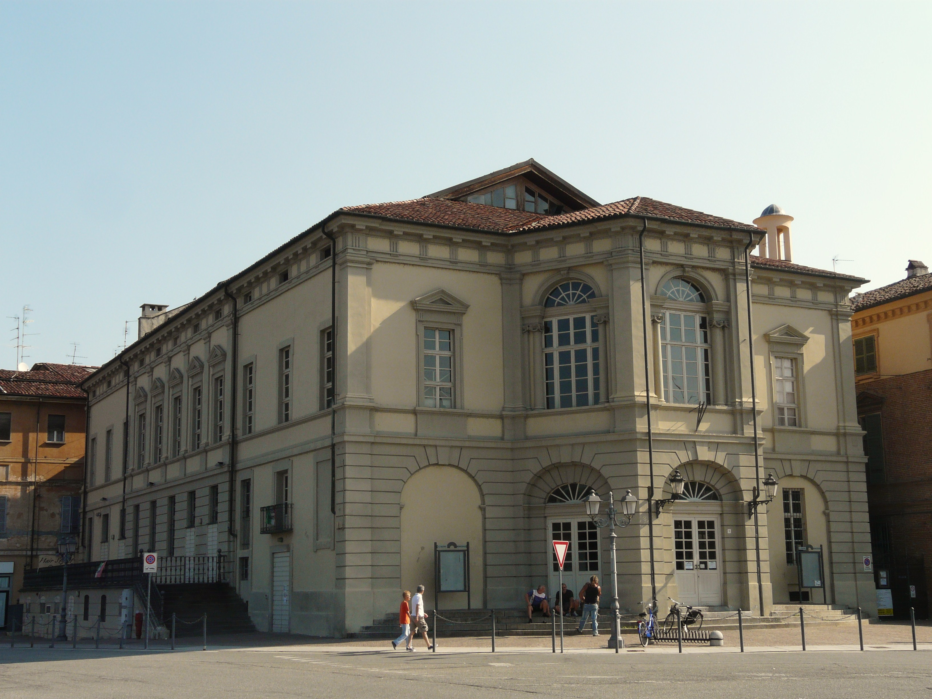 Teatro Civico, Casale Monferrato, Piemonte, Italia